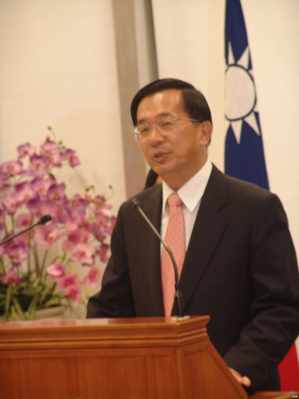 台灣前總統陳水扁。